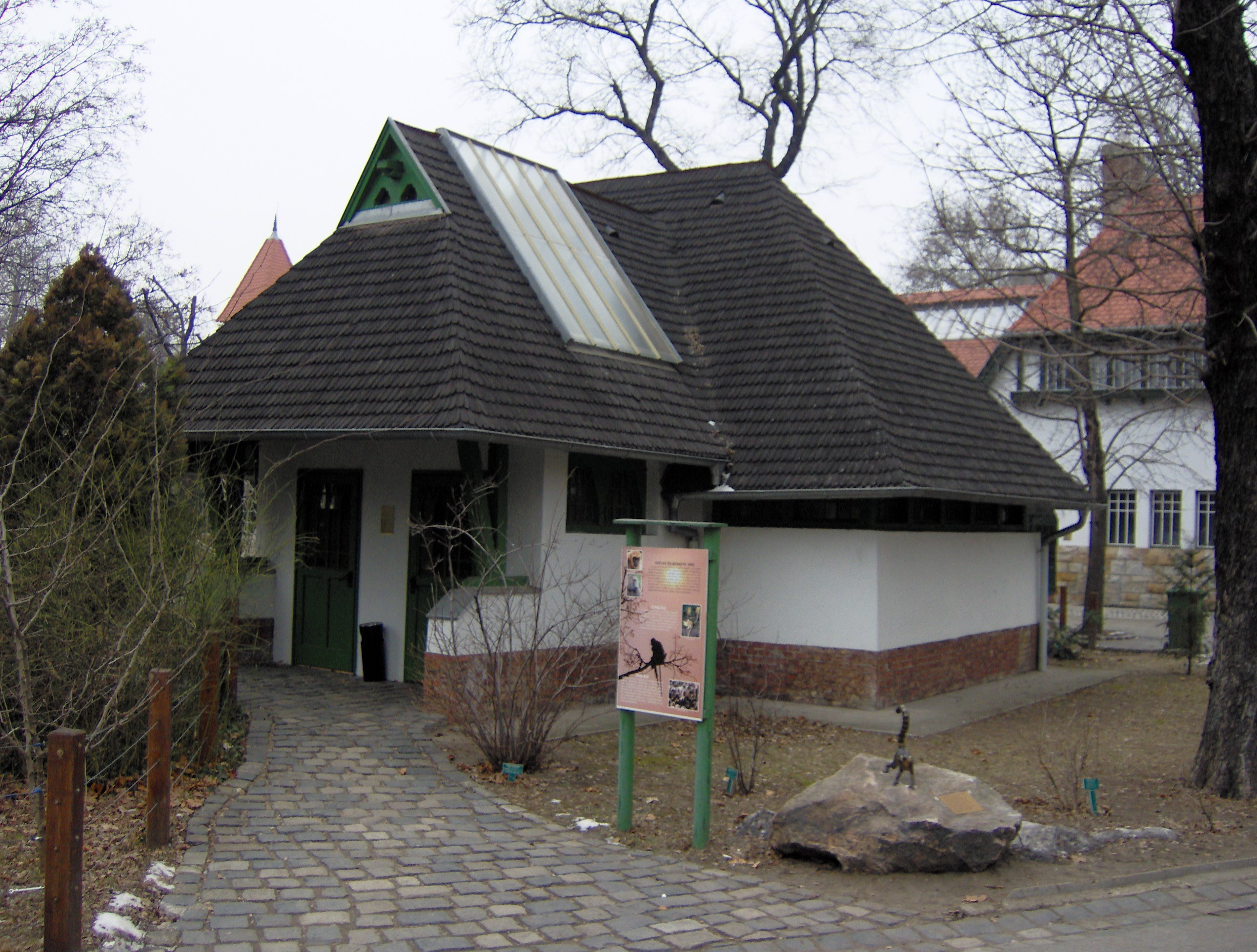 Budapesti állatkert, Makiház